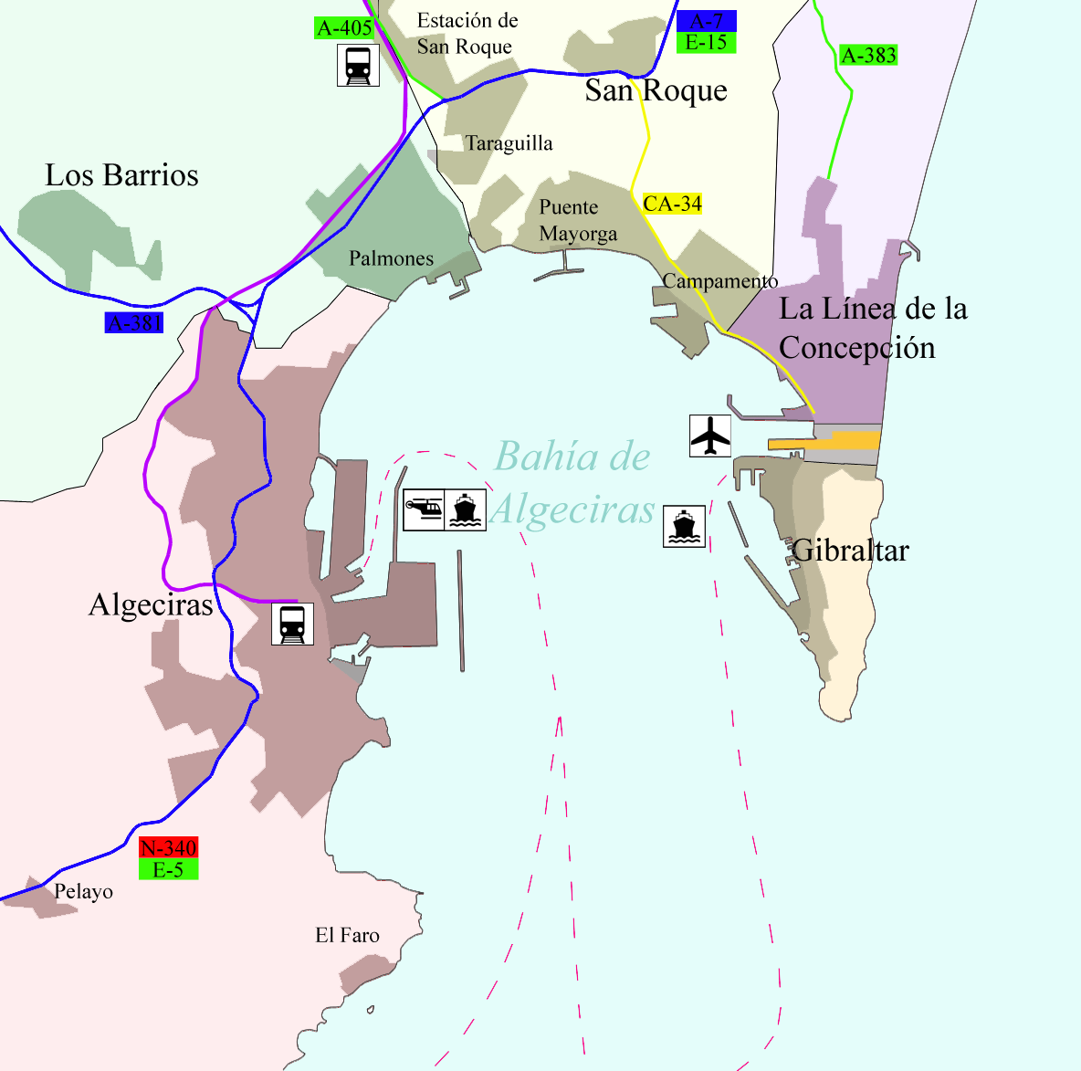 Mapa indicativo de la aglomeración urbana de la bahía de Algeciras y vias de transporte